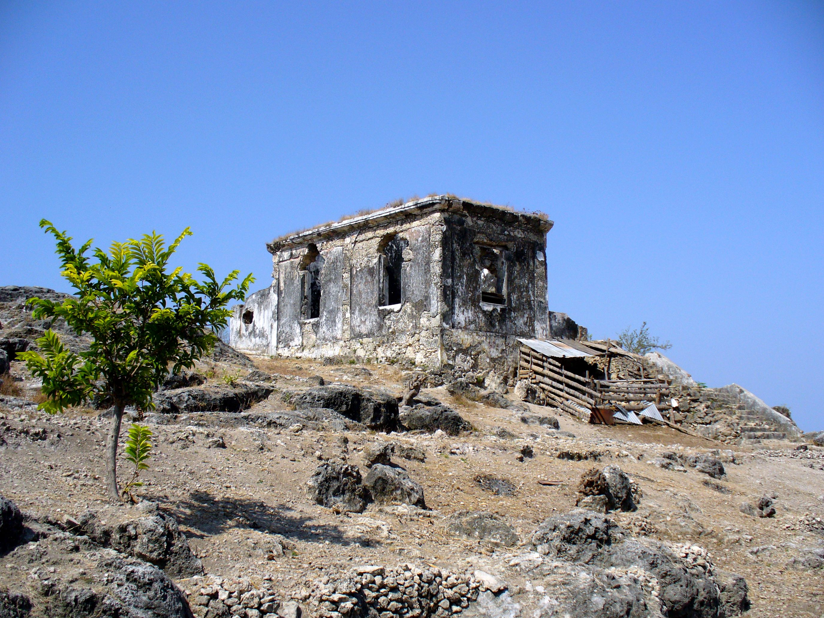 Baucau, East Timor